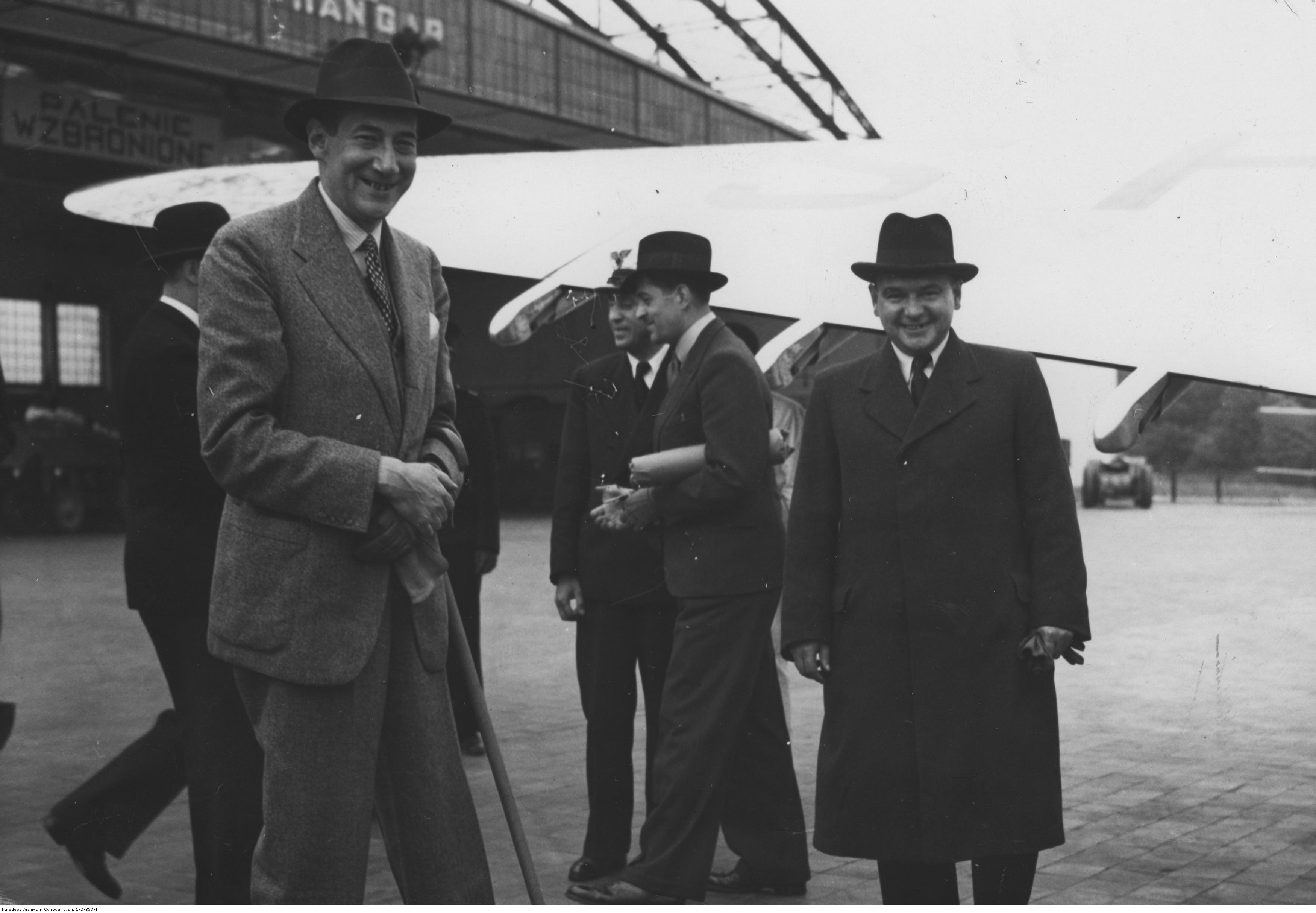 Wyjazd ministra spraw zagranicznych Polski Józefa Becka z wizytą do Estonii 13 czerwca 1938. Minister spraw zagranicznych Polski Józef Beck (z lewej z laską) na lotnisku Okęcie przed odlotem do Tallina. Obok na płycie lotniska widoczny dyrektor techniczny Linii Lotniczych LOT Eugeniusz Roland. Koncern Ilustrowany Kurier Codzienny - Archiwum Ilustracji. Sygnatura: 1-D-353-1